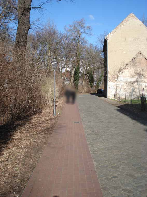 Andeutung des Stadtmauerverlaufes am Plauer Tor der Altstadt Brandenburg an der Havel